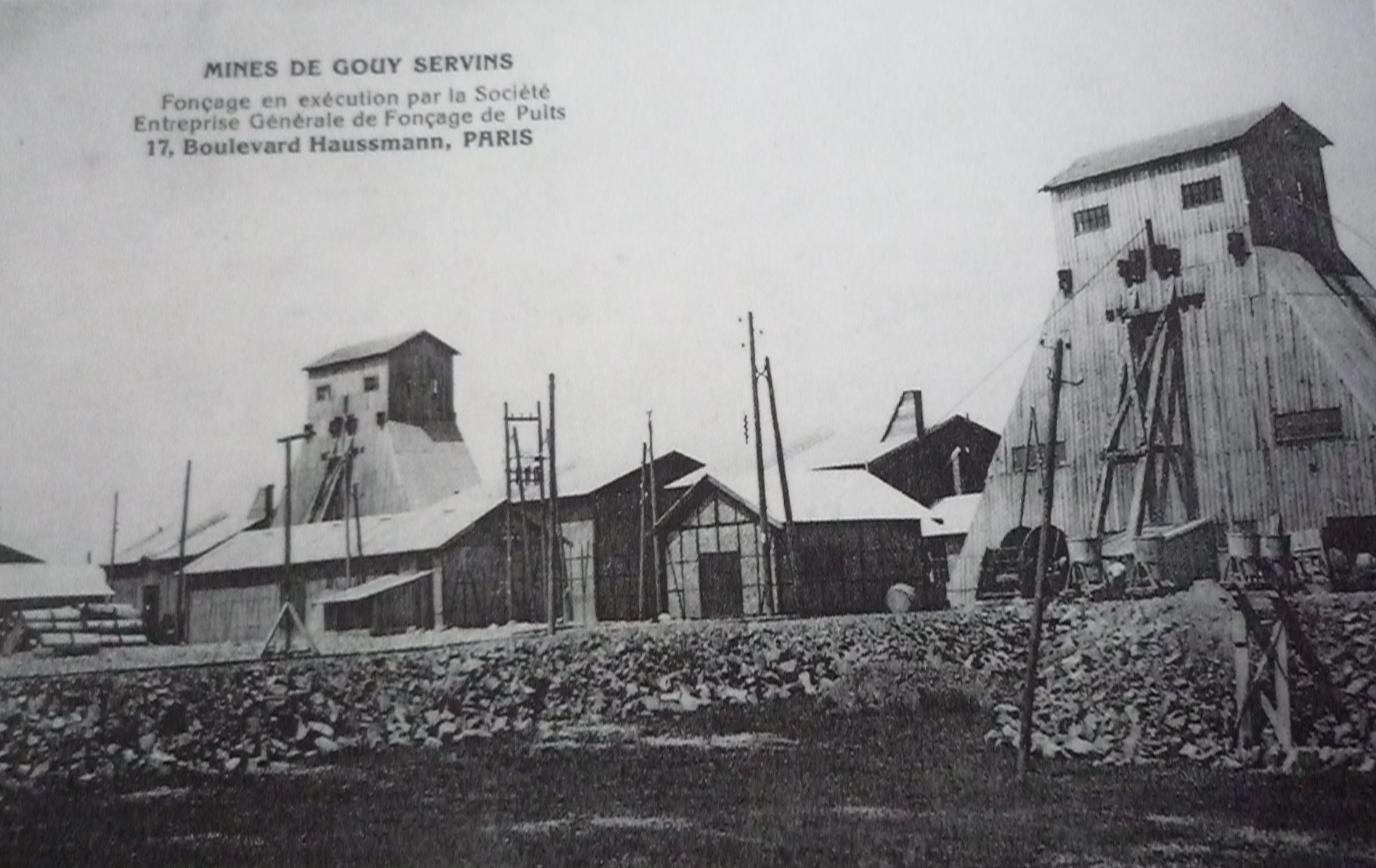 La Fosse n° 1 - 1 bis de la Compagnie des mines de Gouy-Servins et Fresnicourt Réunis était un charbonnage constitué de deux puits situé à Bouvigny-Boyeffles, Pas-de-Calais, Nord-Pas-de-Calais, France. À priori, le puits n° 1 est à gauche, et le puits n° 1 bis à droite.